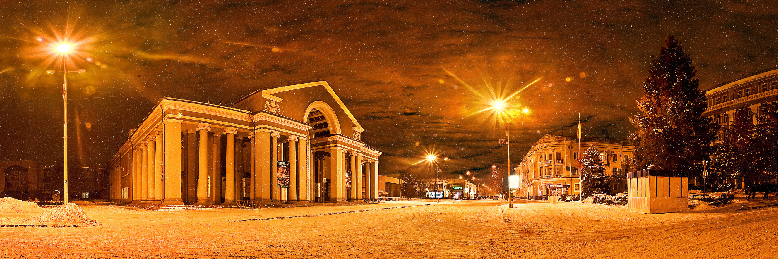 Криворізький академічний міський театр драми та музичної комедії ім. Тараса Шевченка, Кривий Ріг, проспект Карла Маркса, 23